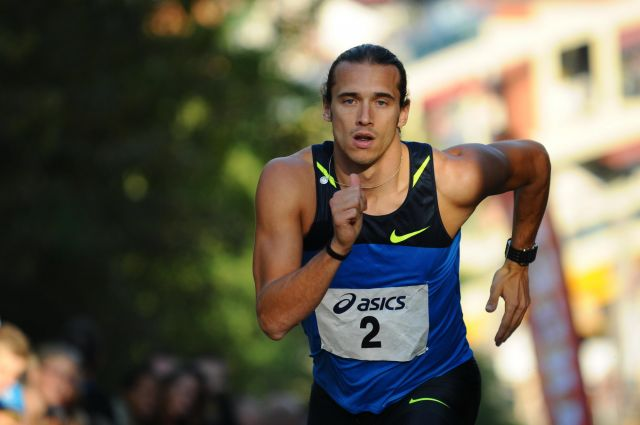 Cédric Van Branteghem, Klimduinrun 2008